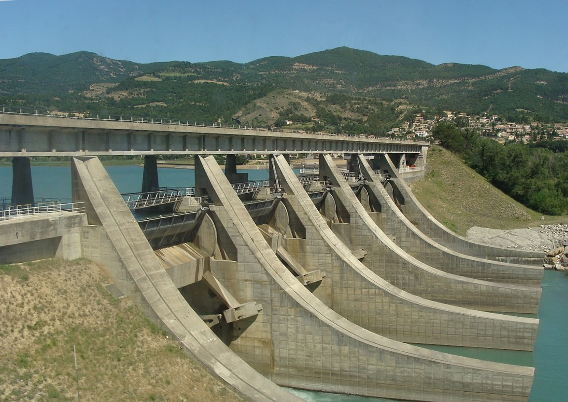 Le pont-barrage de l'Escale (Alpes-de-Haute-Provence) sur la Durance, vu du chemin de fer Marseille - Gap. La route nationale 85 (Sisteron - Digne) passe sur la travée haute de l'ouvrage.